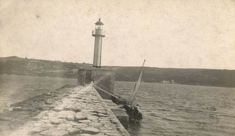 Вълноломът и фарът на пристанището. Платноходка с ветроходци до стената на вълнолома.